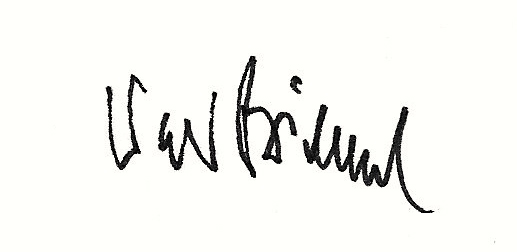 Walter Biemel. Signatur seines Briefes an mich vom 25.02.2008